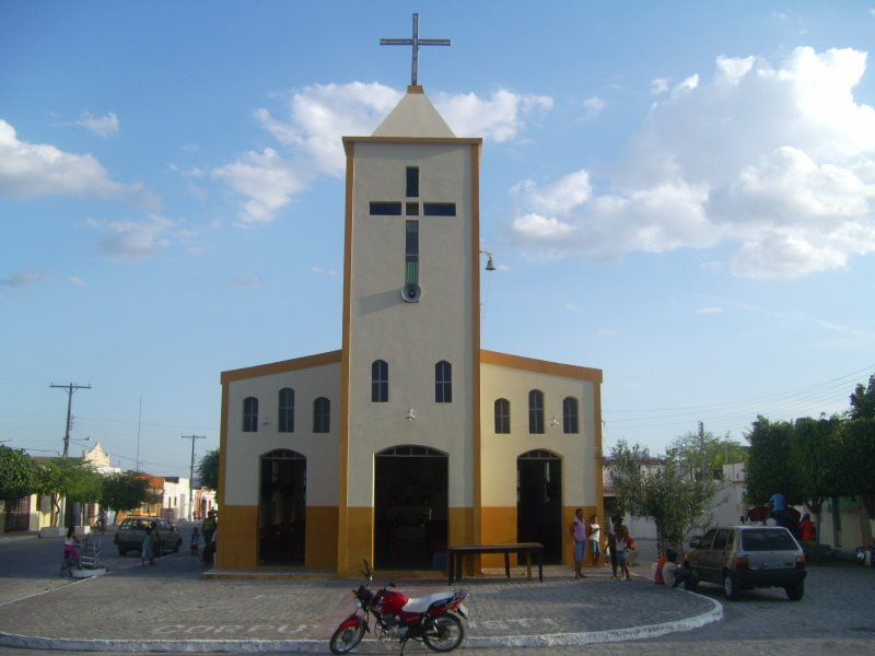 Fonte própria de usuario Elielsonlima. Igreja Matriz de Santo Antonio, na cidade de Ouro Branco - Alagoas, Brasil